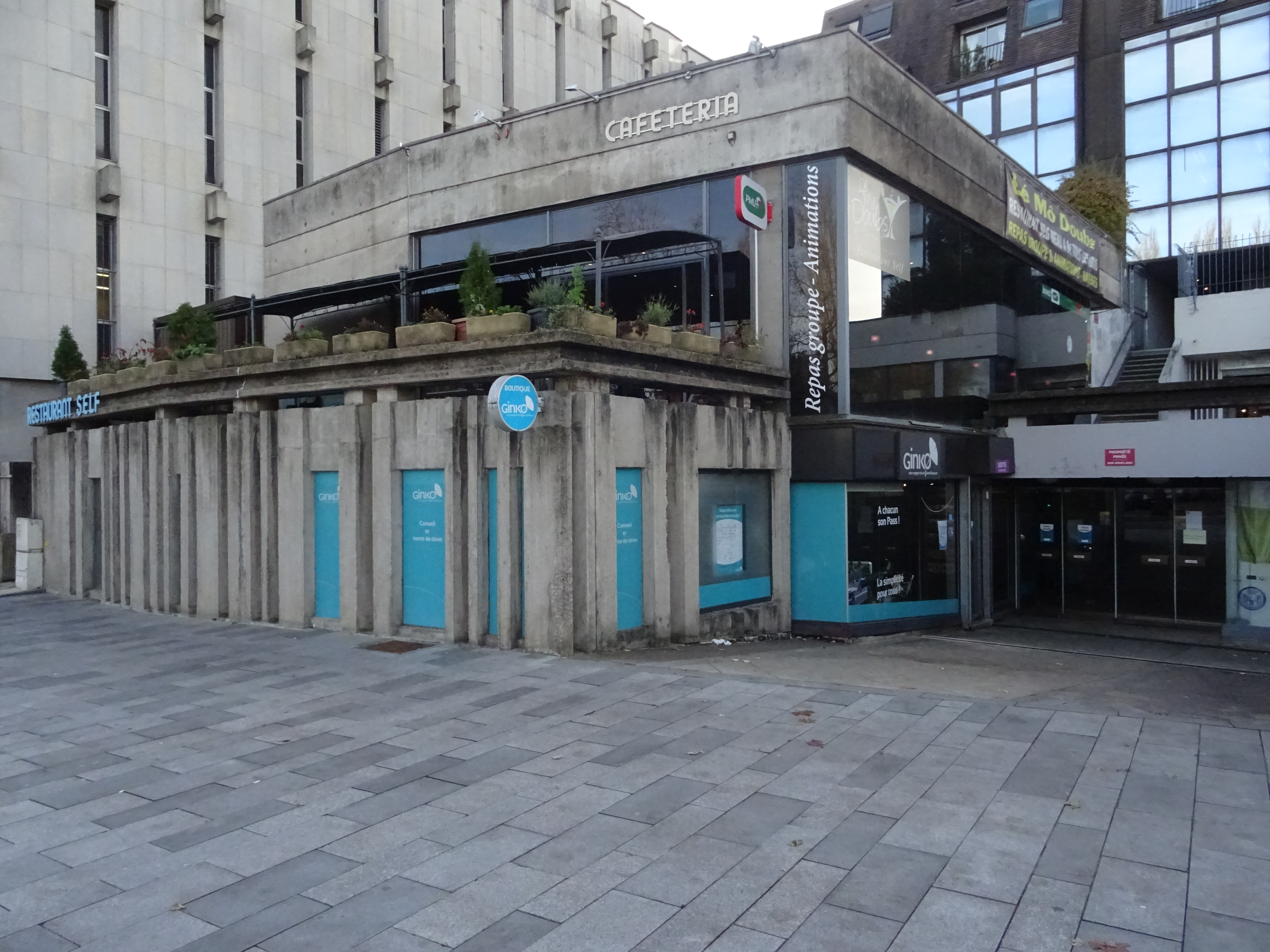 La Boutique Ginko, entrée avenue Gaulard, en 2017